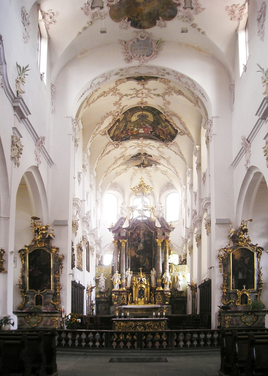 Franziskanerkirche Überlingen, Germany.